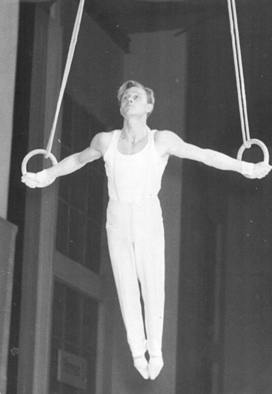 Heinz Otto Werner Zentralbild Leipzig Müller 4.5.1956 Richtfestfeier in Leipzig Am 28. und 29.4.1956 feierten die Bauarbeiter des Stadions der 100.000 gemeinsam mit der Bevölkerung Leipzigs das Richtfest in den Messehallen der technischen Messe. Für ein reichhaltiges Programm sorgten bekannte Künstler und Sportler, die dadurch einen Beitrag zum Gelingen des II. Deutschen Turn- und Sportfestes leisteten. UBz: Spitzensportler zeigten ihr Können. Meister des Sports Heinz Otto Werner (DHfK) bei der Olympiapflichtübung an den Ringen.